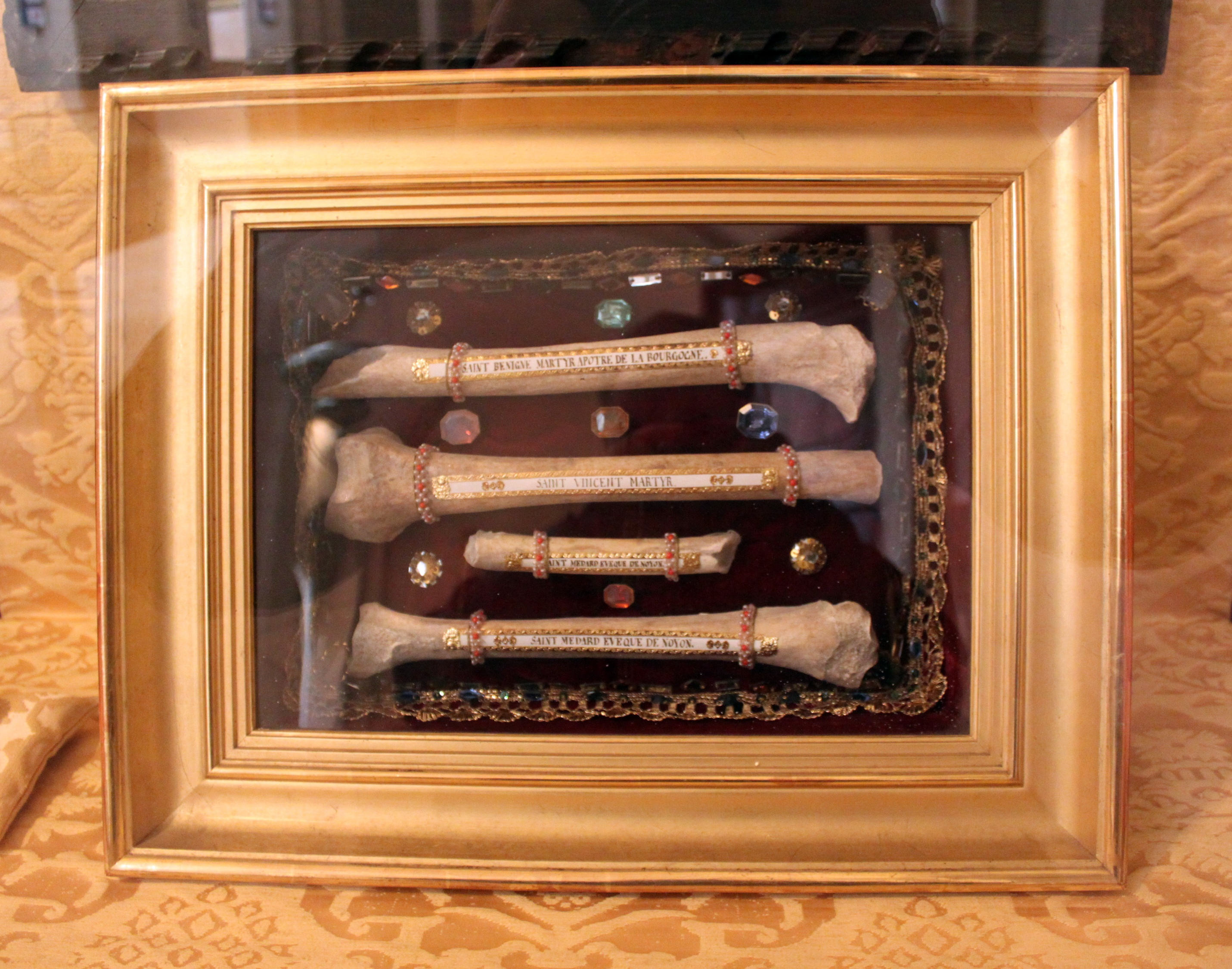 Reliques de plusieurs saints, dont Saint Benigne de Dijon. Musée d'art sacré de Dijon, Dijon, Côte-d'Or, Bourgogne, FRANCE